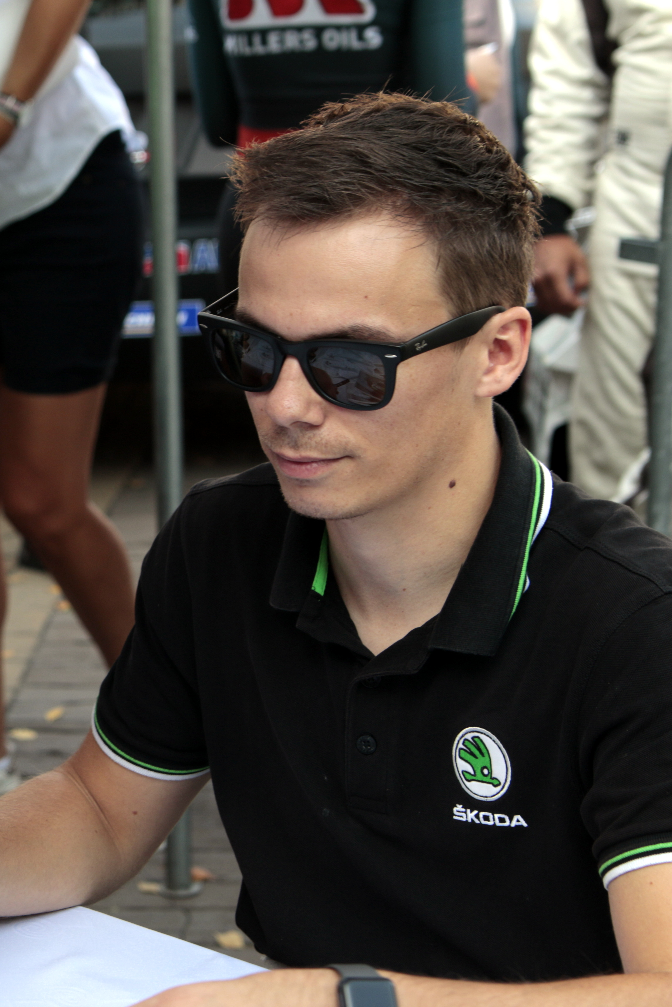 Rajd Polski 2018 - Fabian Kreim